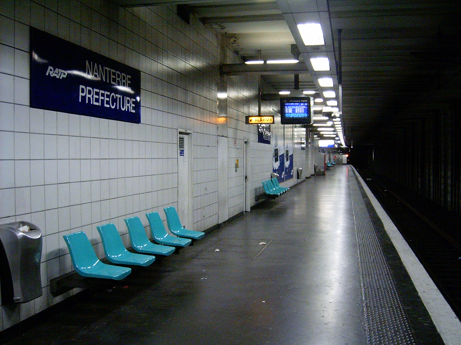 Gare de Nanterre Préfecture : vue du quai direction Cergy/Poissy.